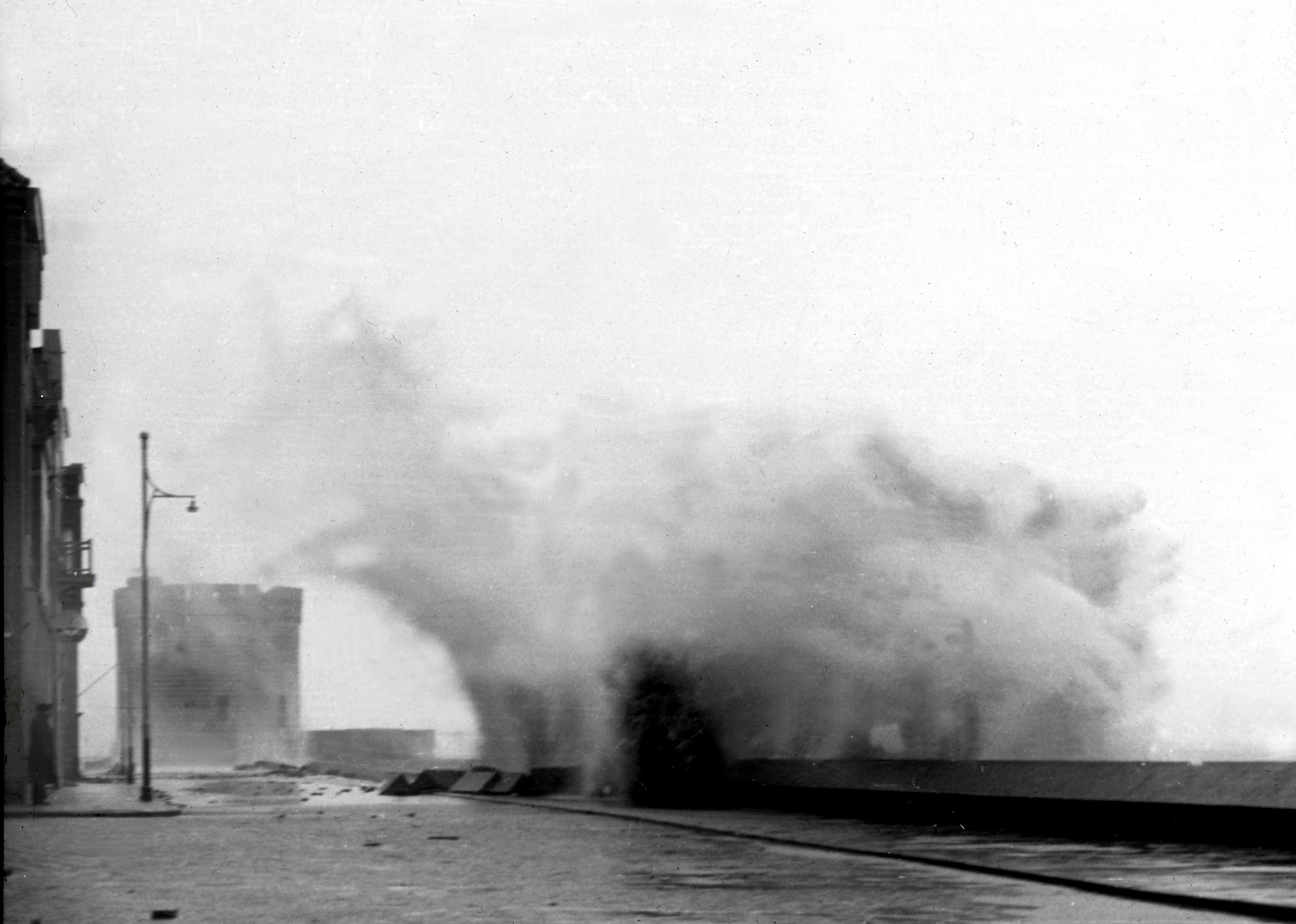 Wave overtopping over the seawall in Vlissingen, vermoedelijk in 1953 of 1954